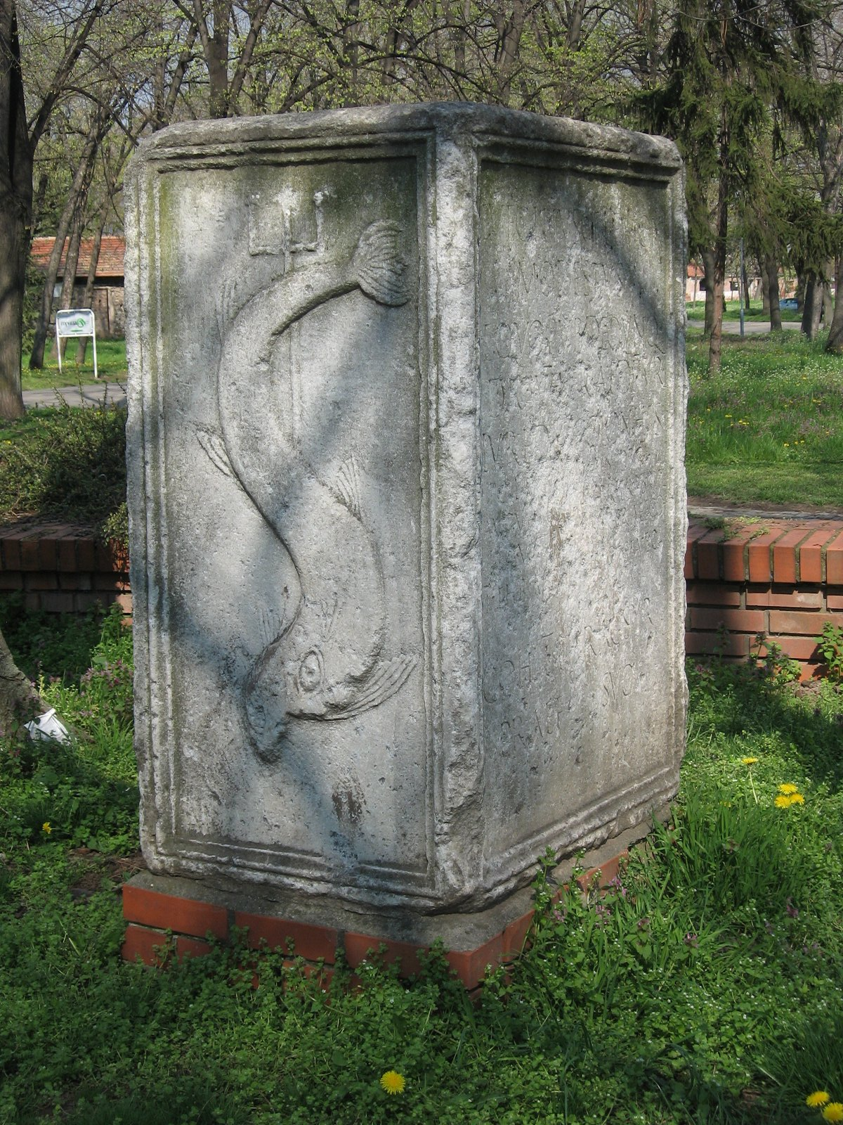 Липадаријум у Нишкој тврђави. Снимљено у априлу 2010.